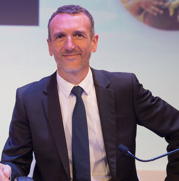 Photo d'Emmanuel Faber, DG de Danone